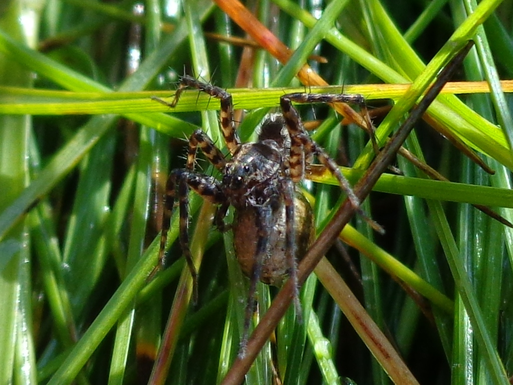 Pardosa prativaga. Found in Lilaste region, Latvia